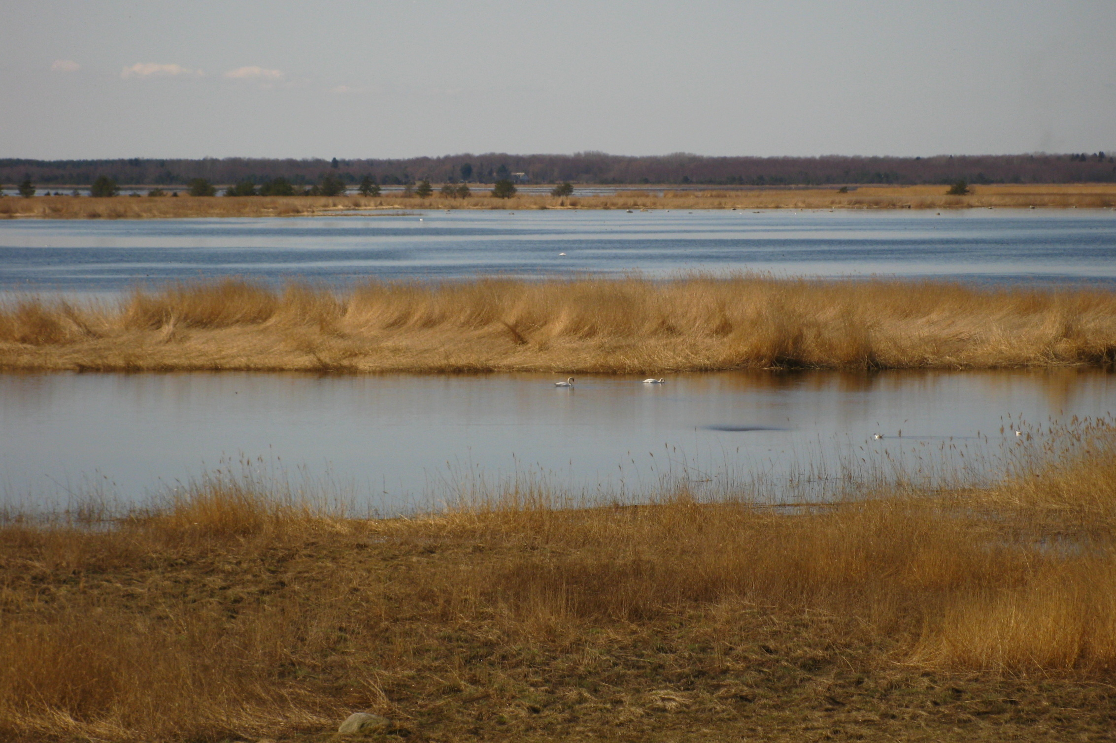 Saunja laht Saunja linnuvaatlustornist, Silma LKA